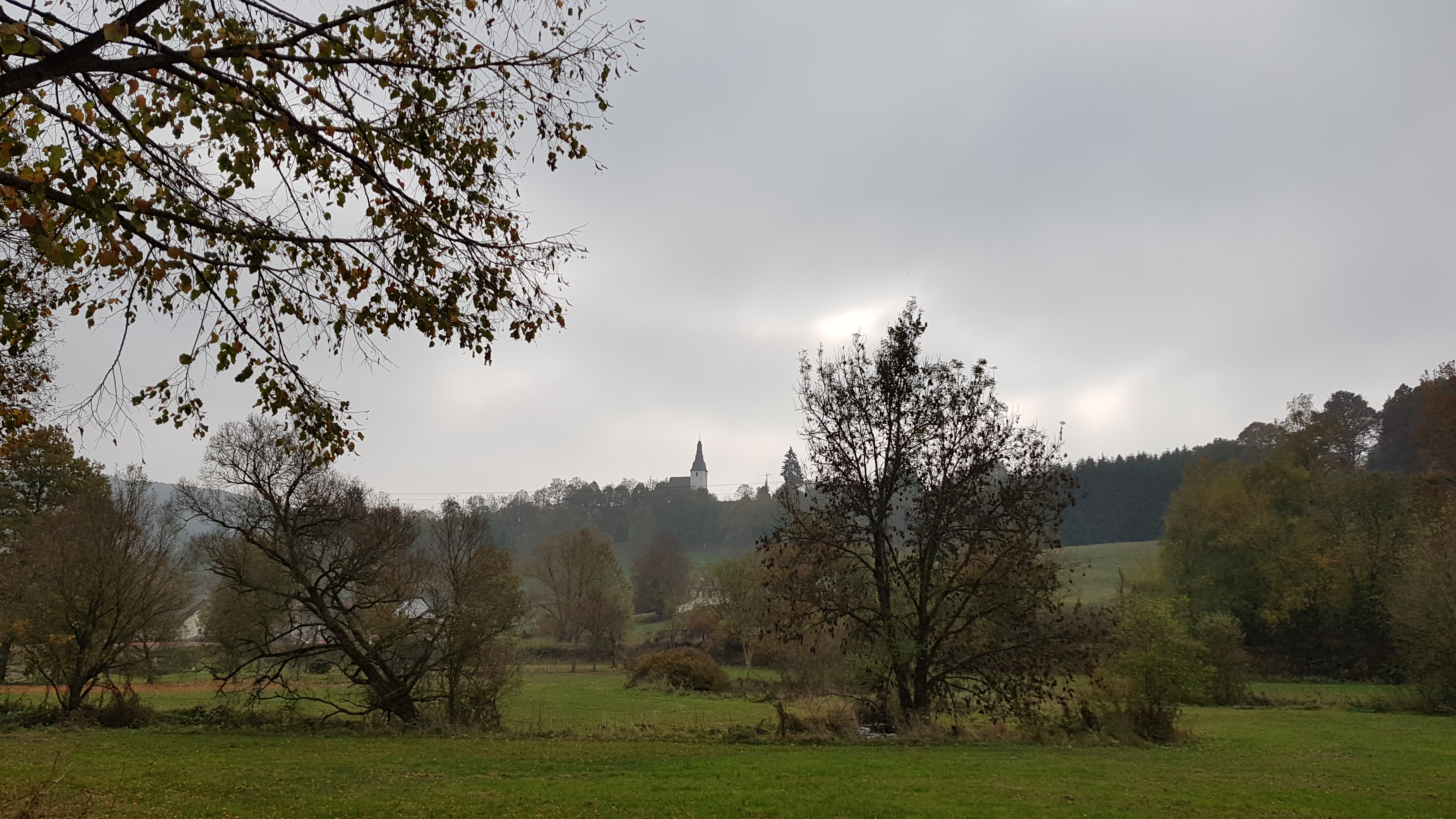 Kapelle St. Hubertus, Weweler, Burg-Reuland, Belgien This photo of immovable heritage has been taken in the Walloon Region